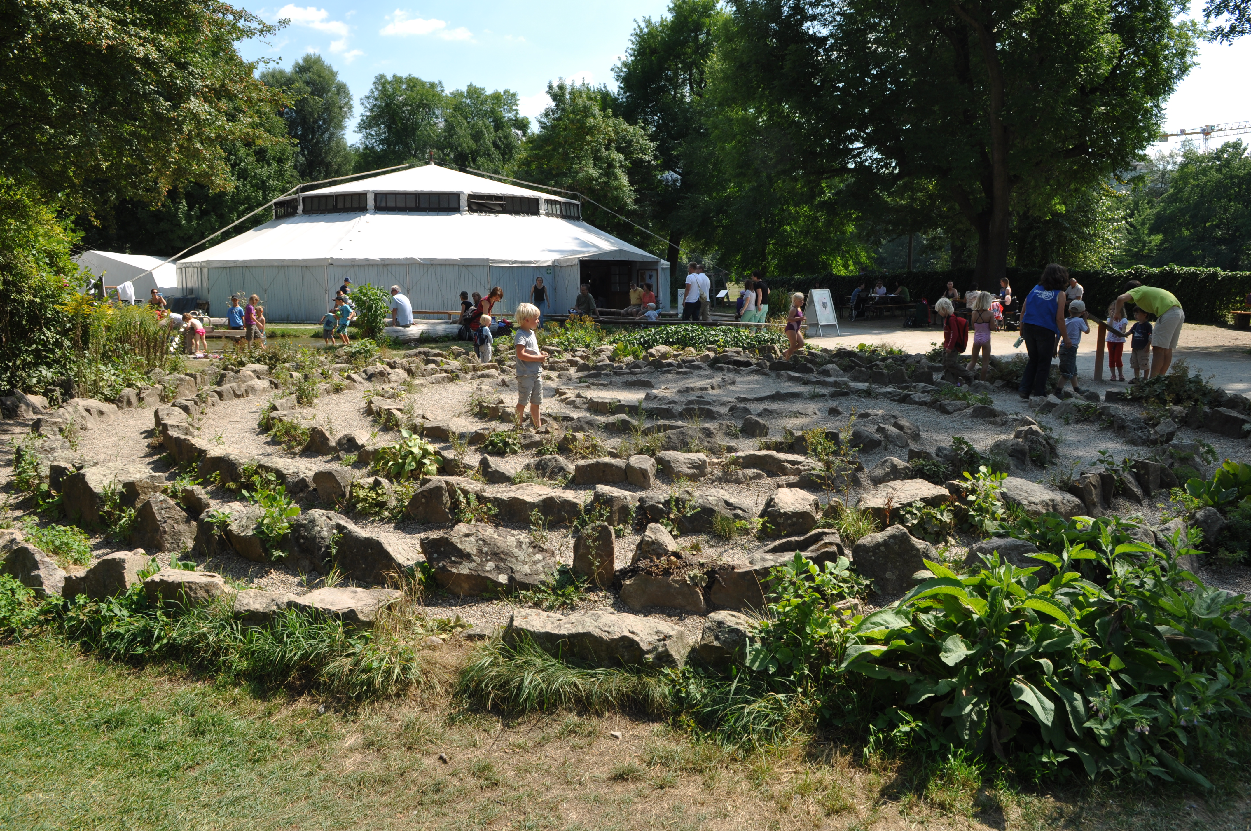 Ansicht auf das Hippodrom und das Labyrinth des Erfahrungfeld zur Entfaltung der Sinne Nürnberg